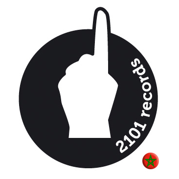 2101 Records flag